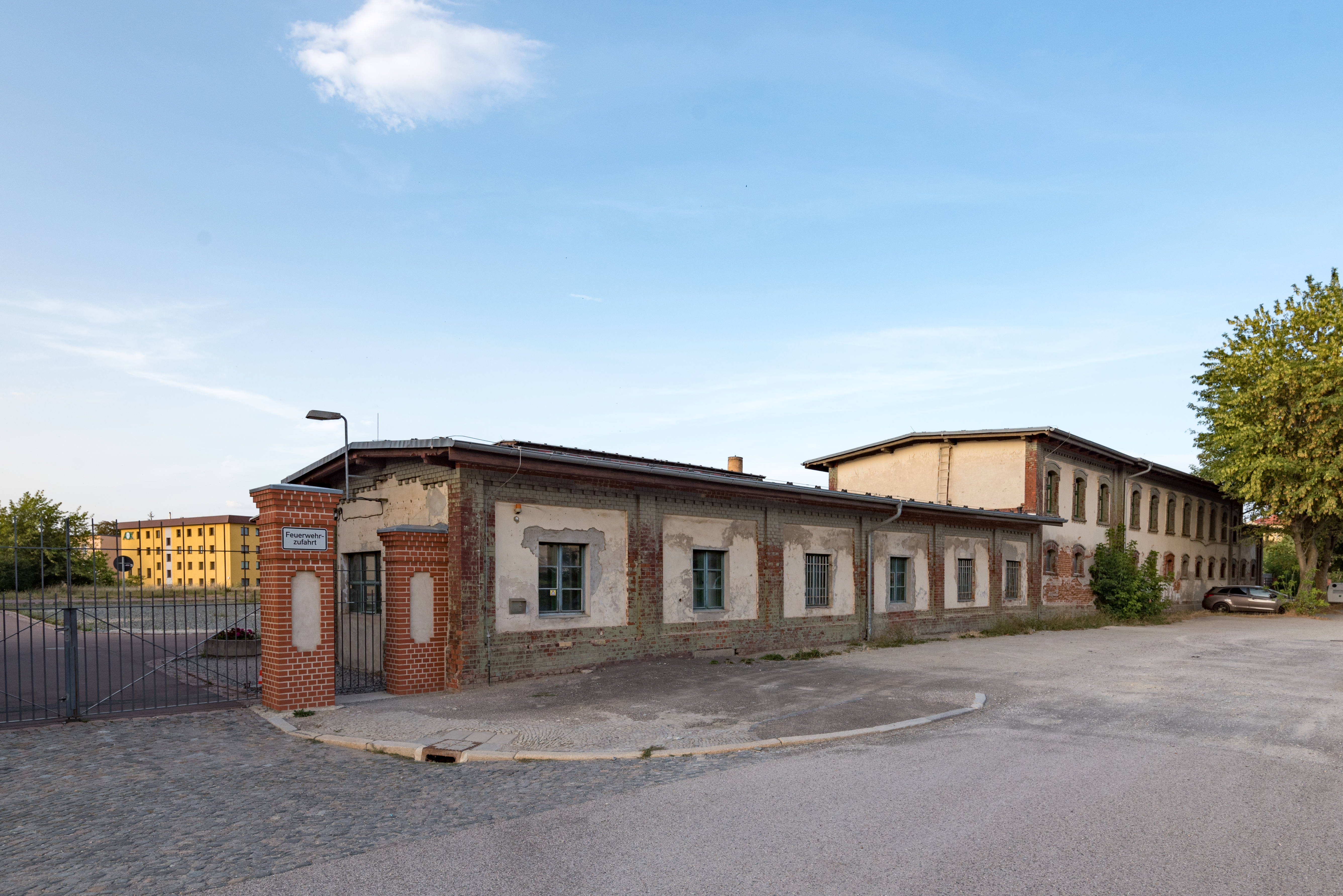 Naumburg (Saale), Roßbacher Straße, Ehemaliger Schlachthof